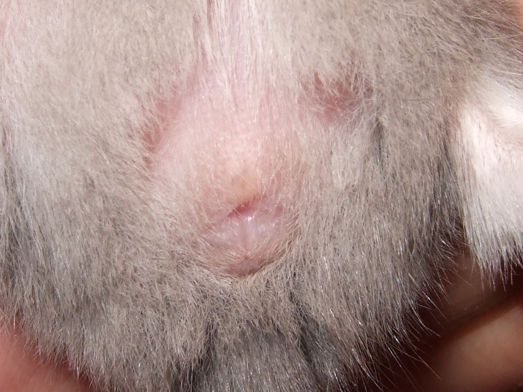 母坎貝爾侏儒倉鼠